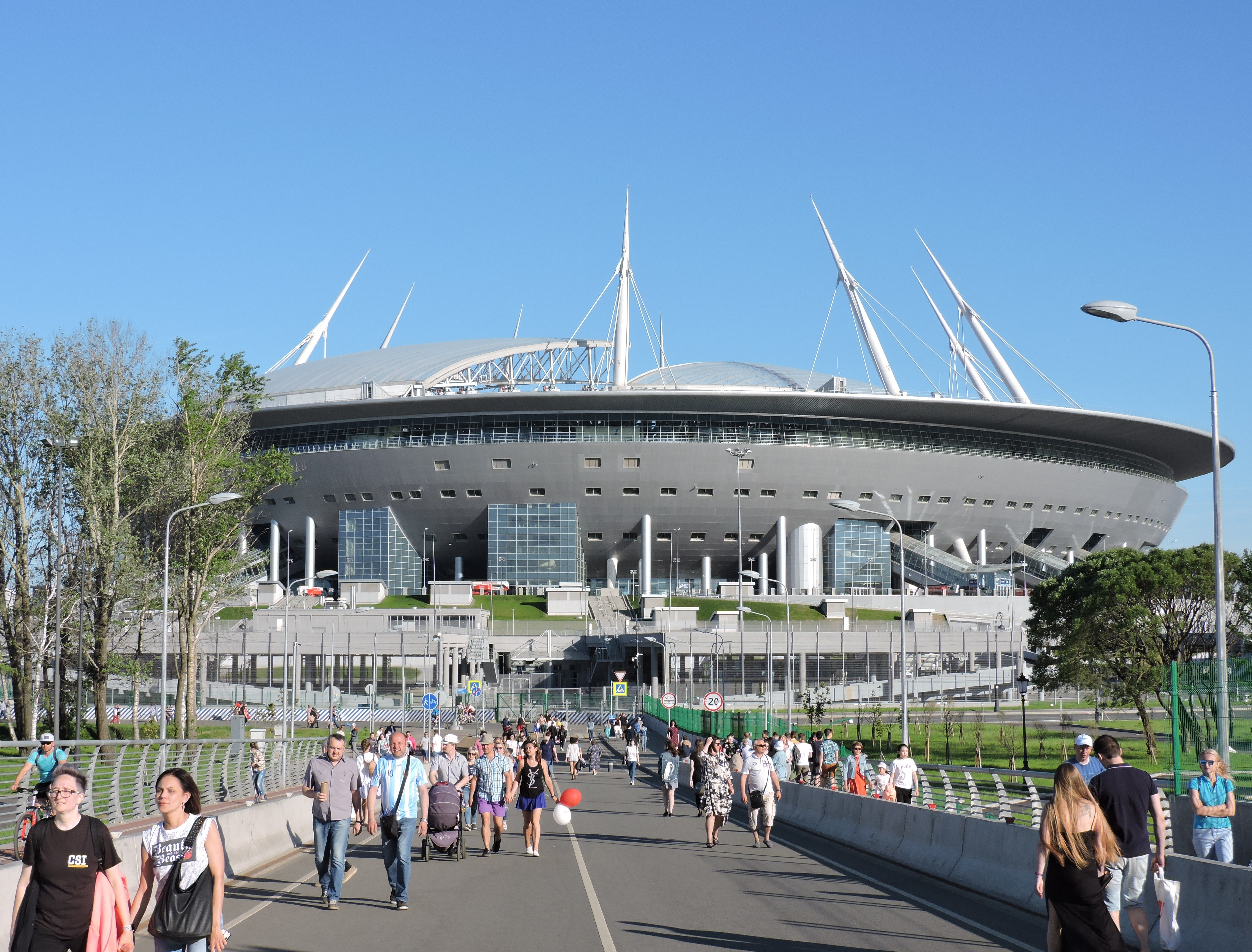 Стадион "Санкт-Петербург" с Яхтенного моста